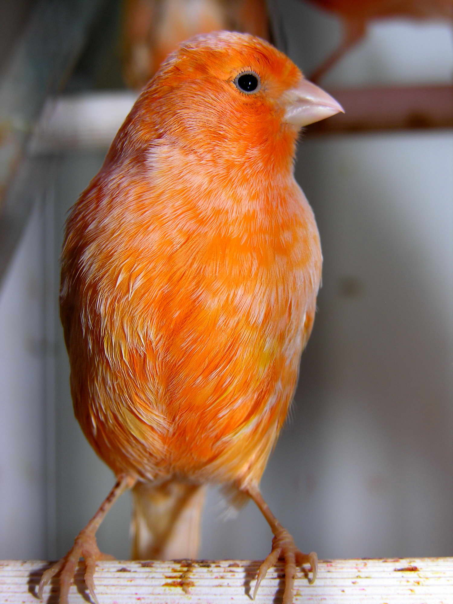 self made.